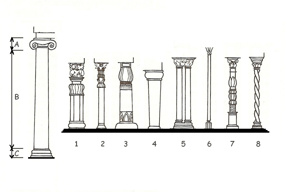 Kolumna w architekturze - przykłady